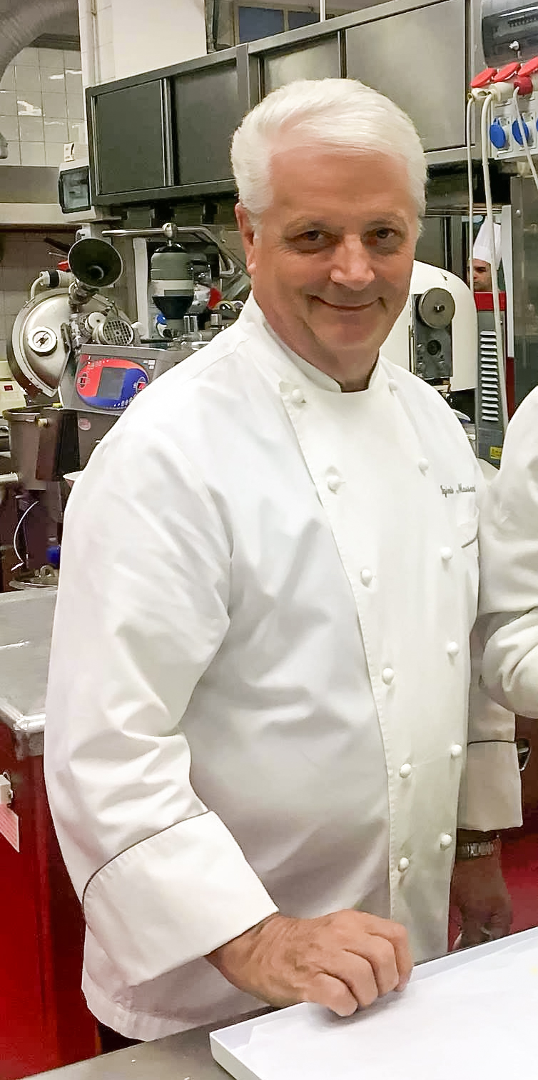 Iginio Massari nel suo laboratorio